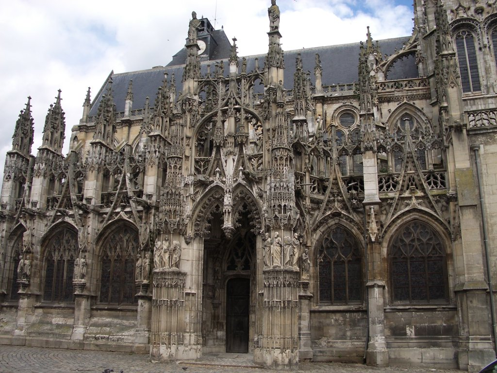 Eglise Notre Dame - Louviers - Eure